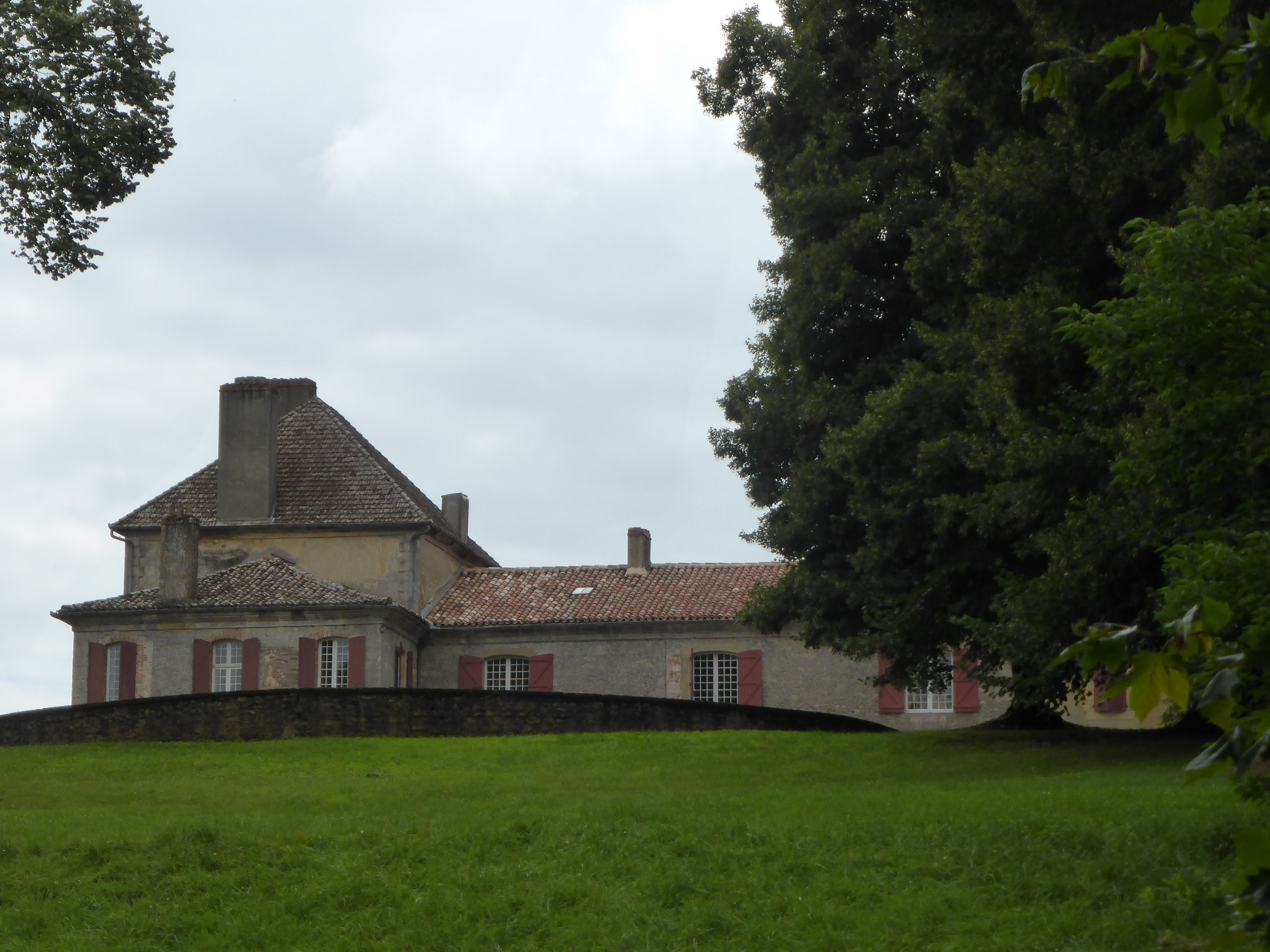 Château de Barrau, à Castex d'Armagnac, dans le Gers.